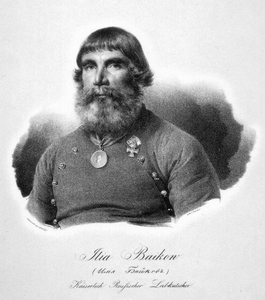 Лейб-кучер Александра I Илья Иванович Байков